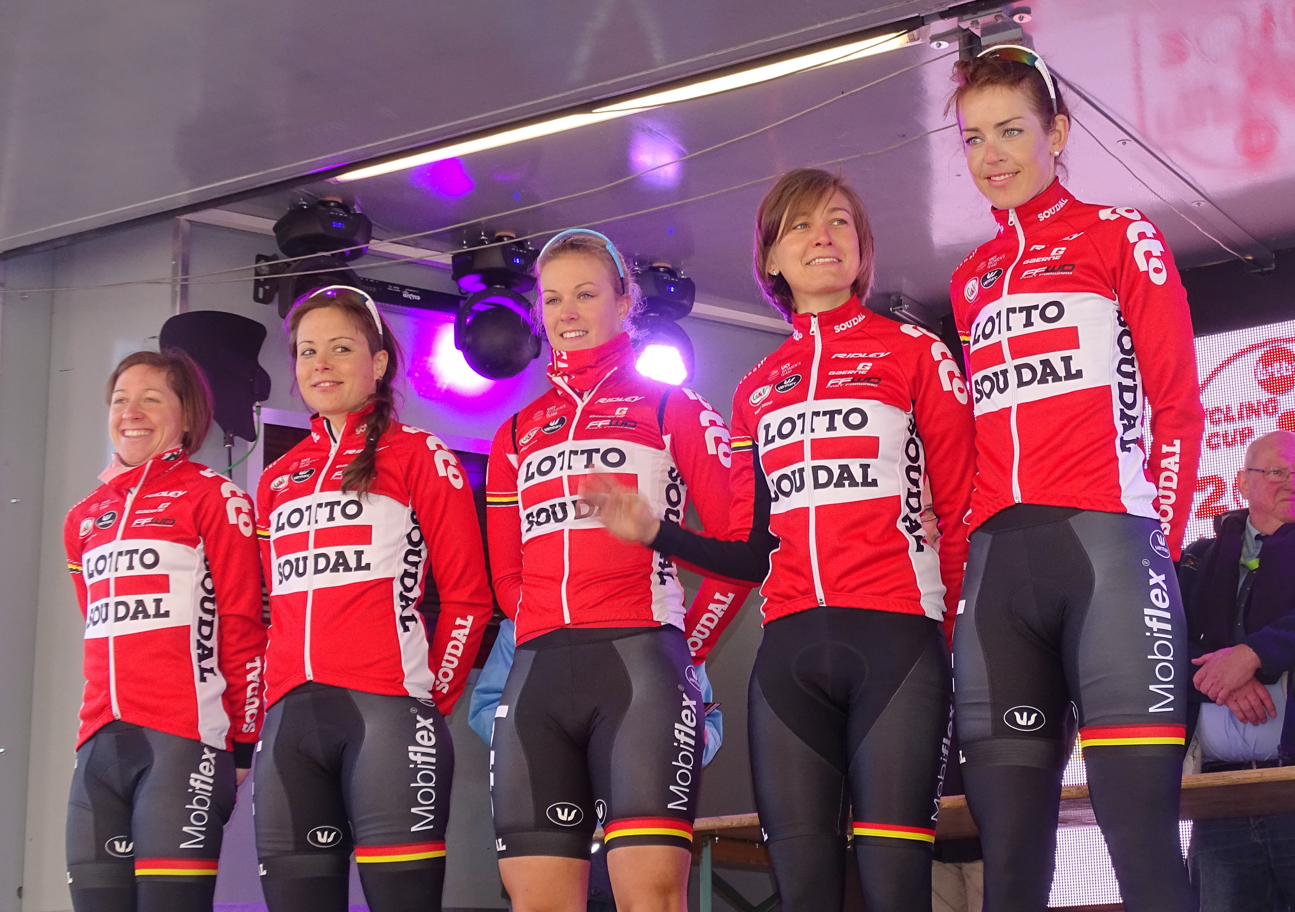 Reportage réalisé le mercredi 2 mars à l'occasion du départ du Samyn des Dames 2016 et du Samyn 2016 à Quaregnon, Belgique.